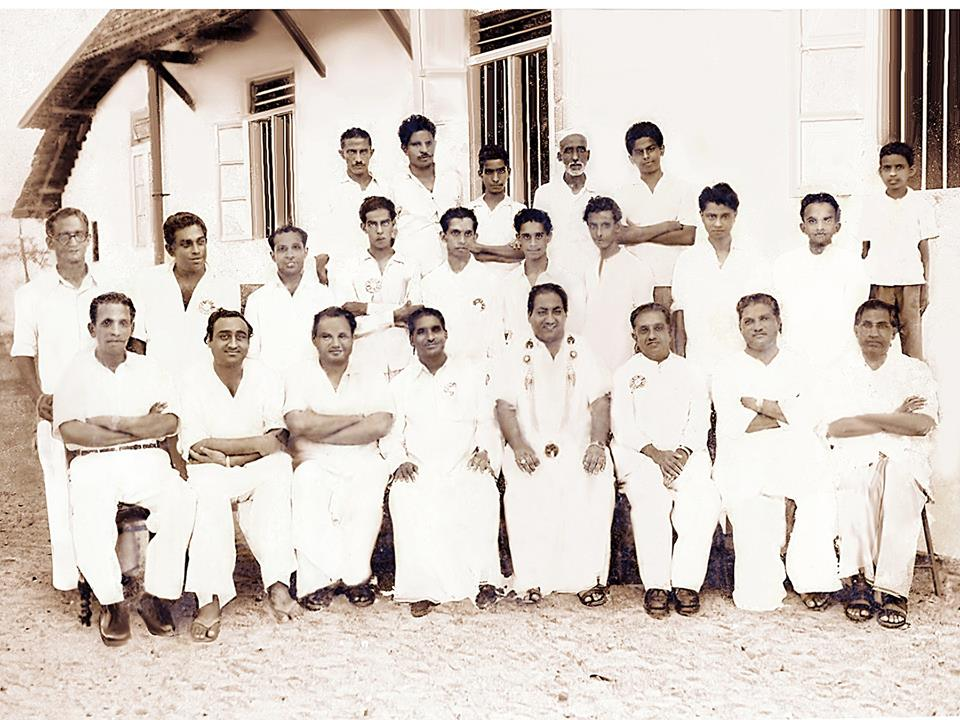 Mohd Rafi during his visit at Thalassery, Kerala sometime around 1960